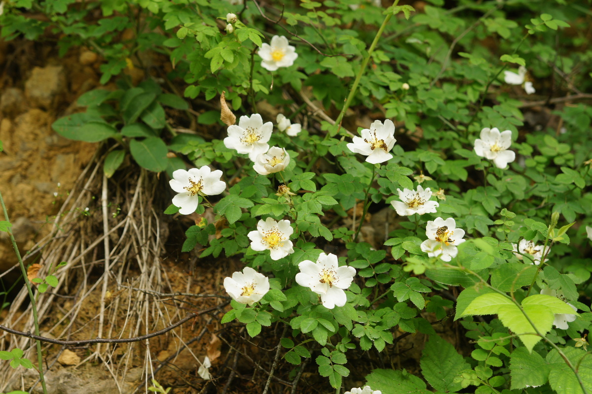 Njivski šipek na Petačevem grabenu.